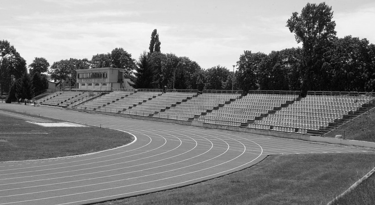 Trybuny stadionu lekkoatletycznego w Stargardzie